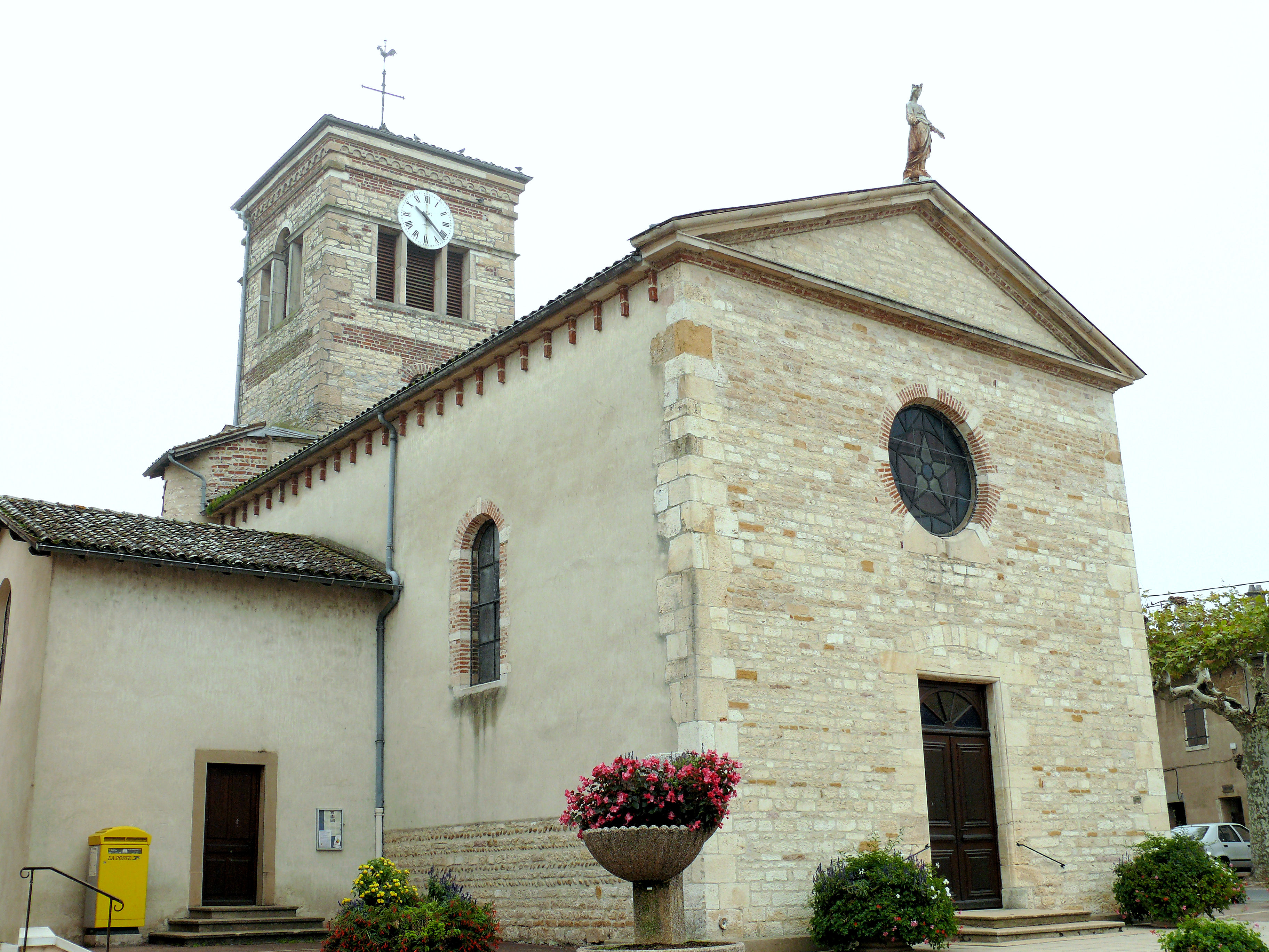 Villeneuve (Ain) - Eglise Sainte-Madeleine